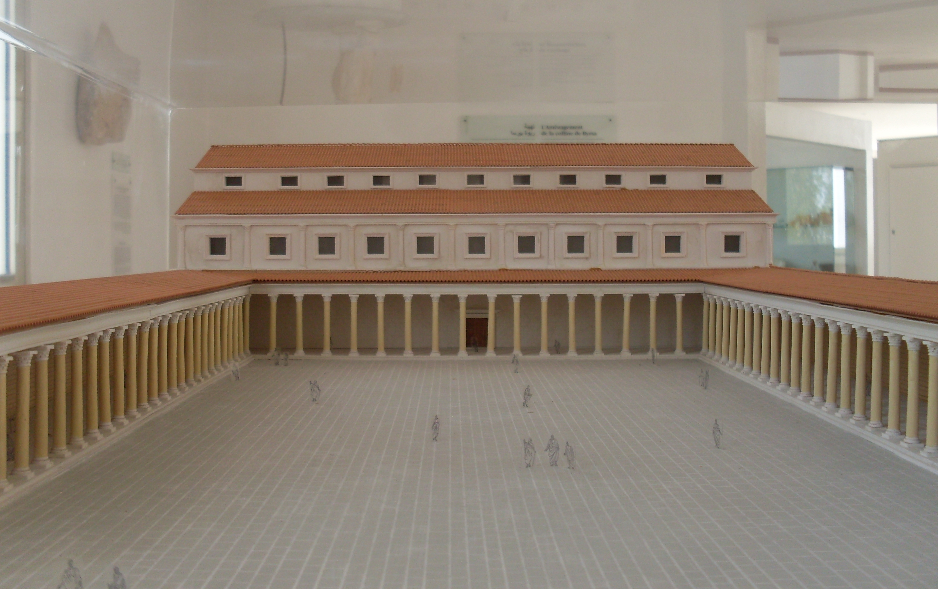 Tunisie, Musée de carthage, Maquette du forum de Byrsa